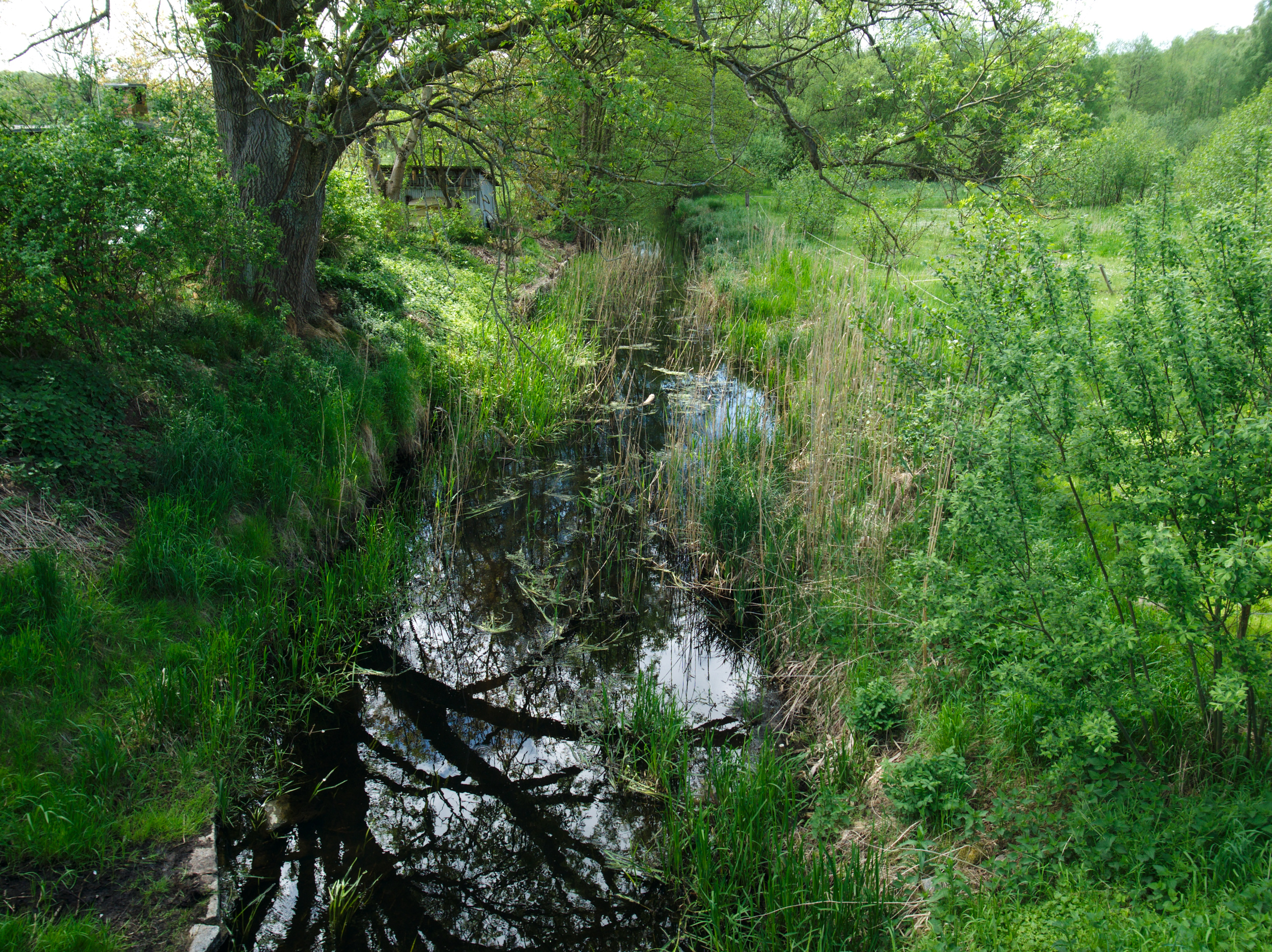 Nausdorfer Kanal von der Brücke bei Nausdorf im Landkreis Prignitz, Deutschland; Blick gen Südwesten